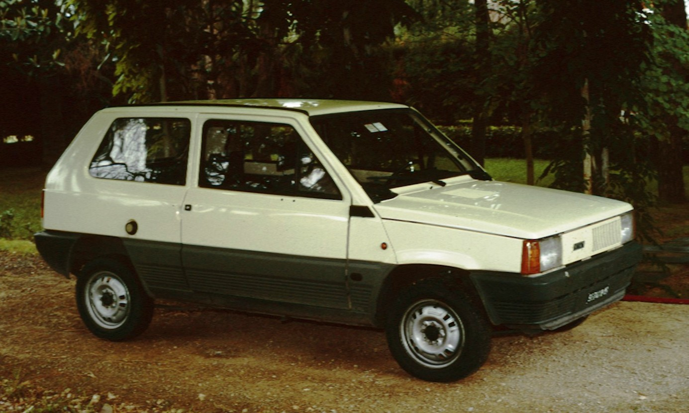 Fiat Panda in Castiglione del Lago